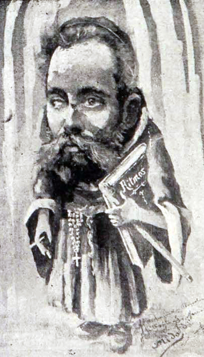 Caricatura del poeta y periodista chileno Pedro Antonio González (1863-1903), publicada originalmente en la revista Santiago Cómico, 21.10.1900